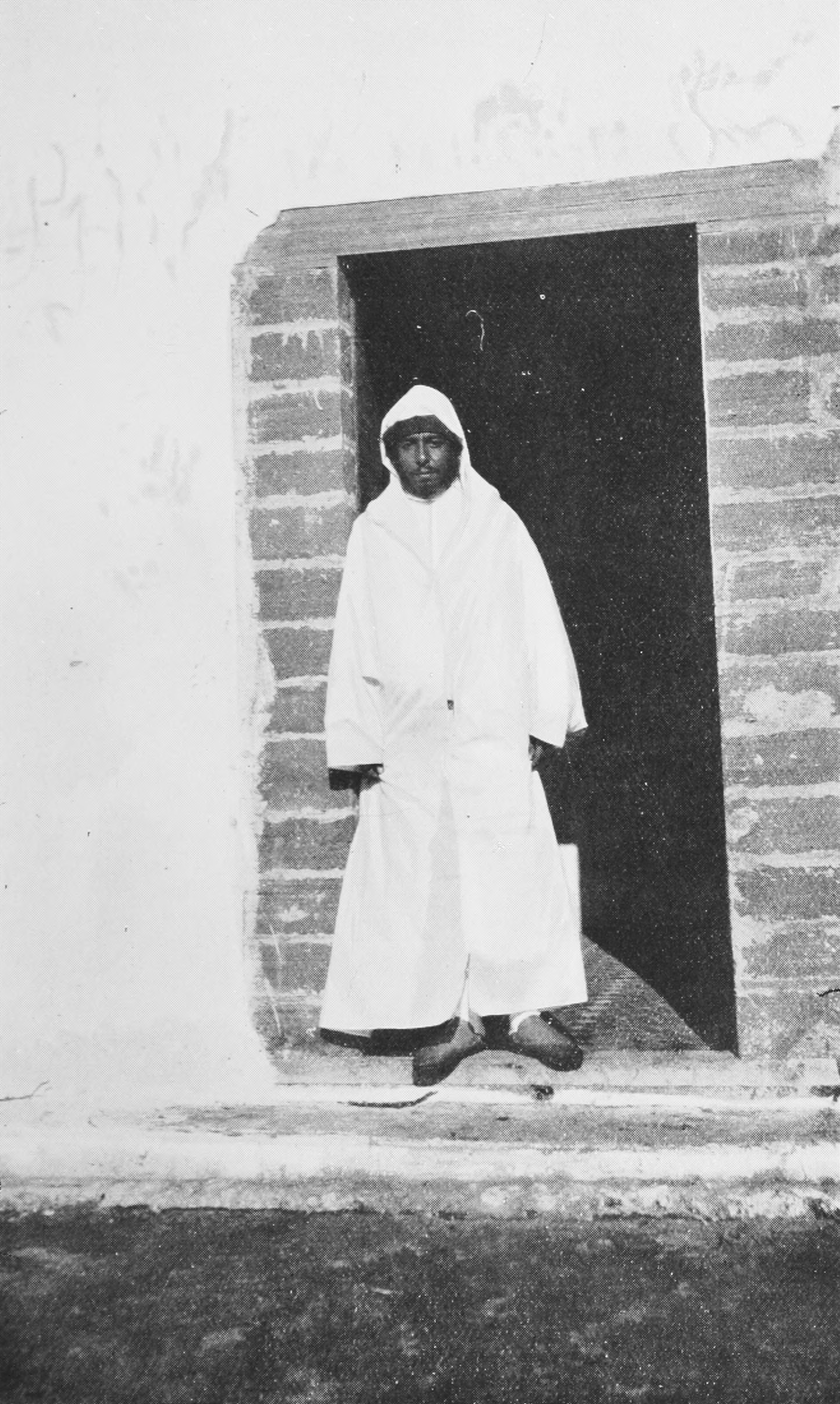 Abdelaziz, Sultan of Morocco (1878-1943)